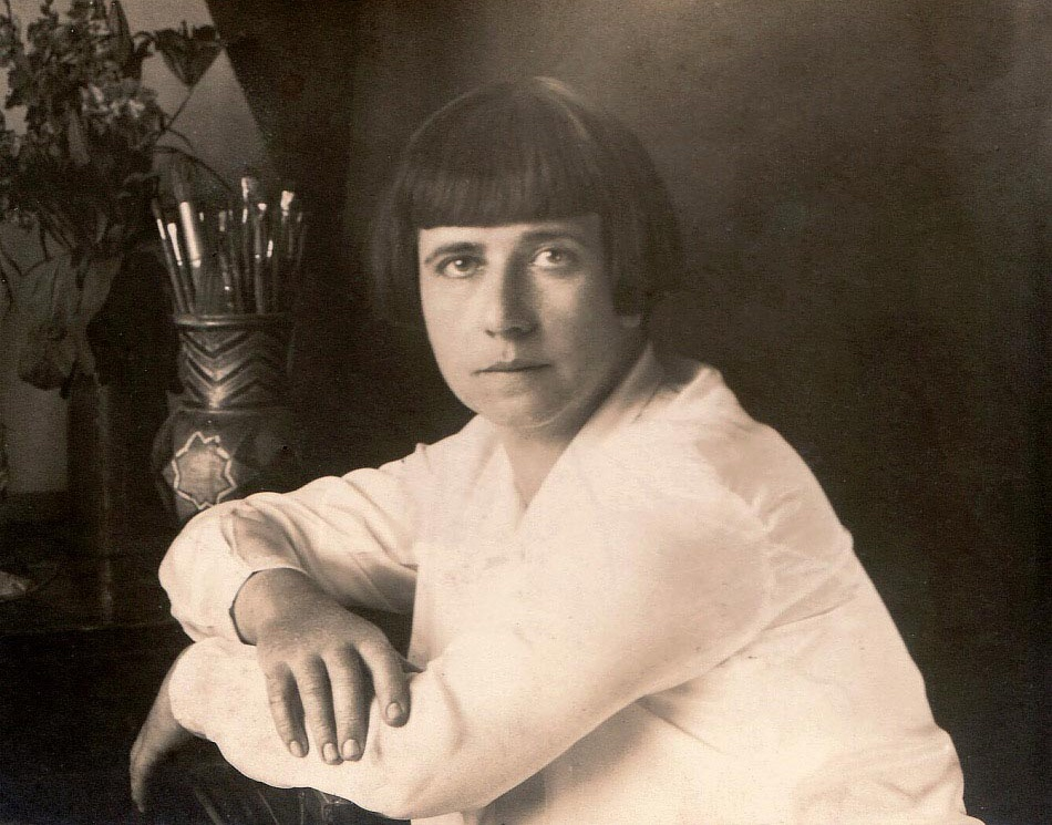 Linka Procházková (1884 - 1960), Česká malířka.